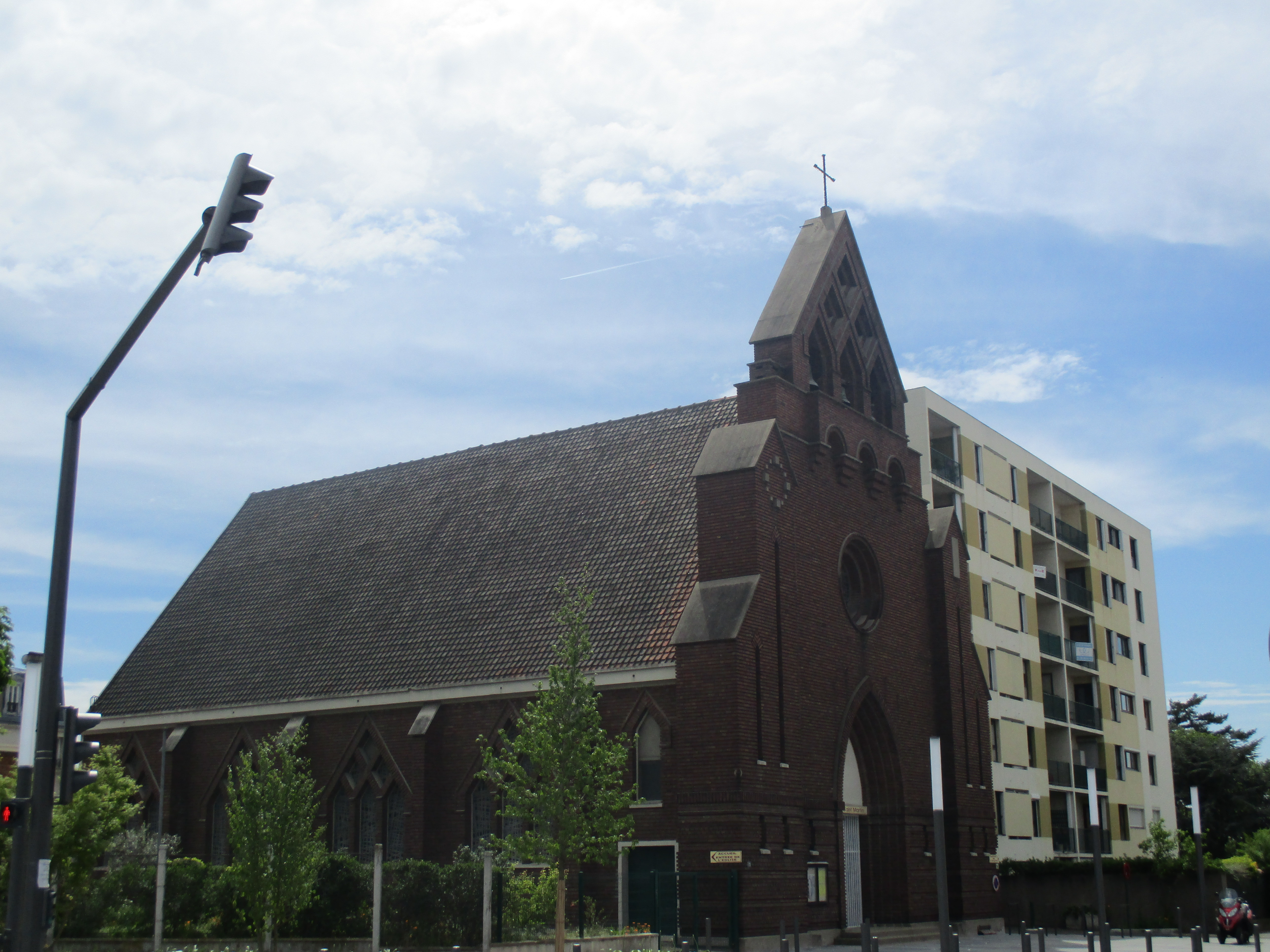 Vue de côté de l'église Saint-Martin de Bezons.